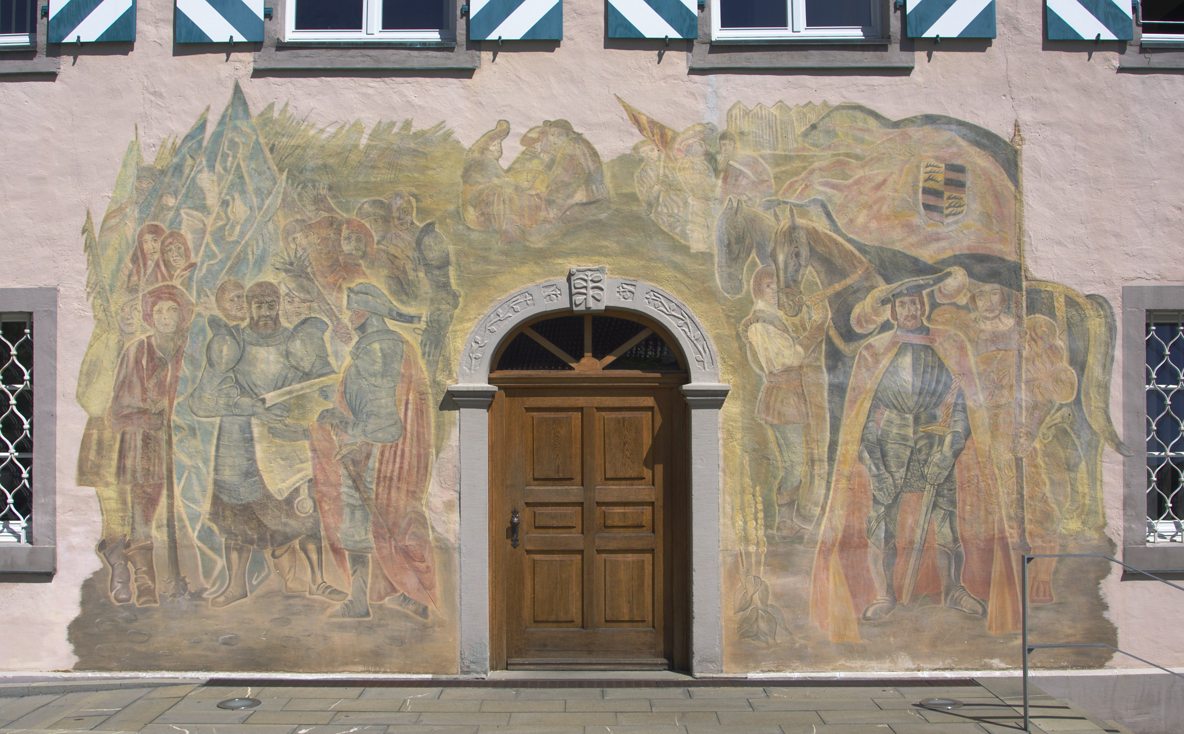 Großflächiges Wandgemälde am Rathaus der Gemeinde Herdwangen-Schönach zum Bauernkrieg von 1525, das im Jahr 1965 vom Mannheimer Kunstmaler Carolus Vocke angefertigt wurde